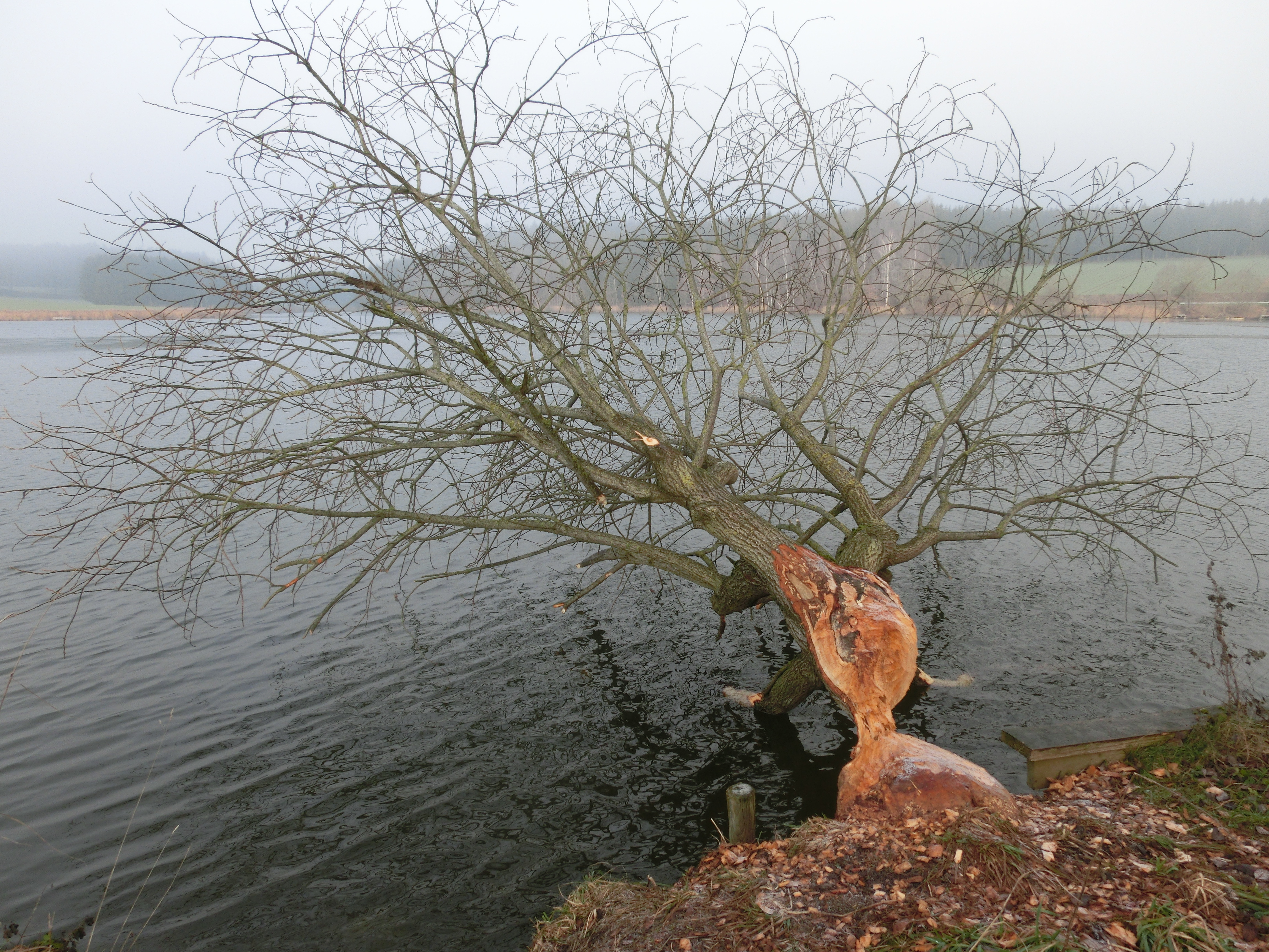 Deutschland (D) - Baden-Württemberg (BW) - Landkreis Sigmaringen (SIG) - Ostrach: Lausheimer Weiher, Biberfraßspuren